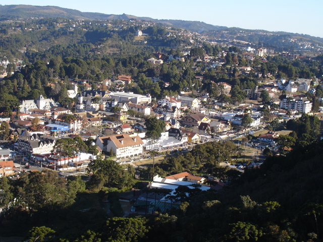 Campos de Jordão, São Paulo, Brasil